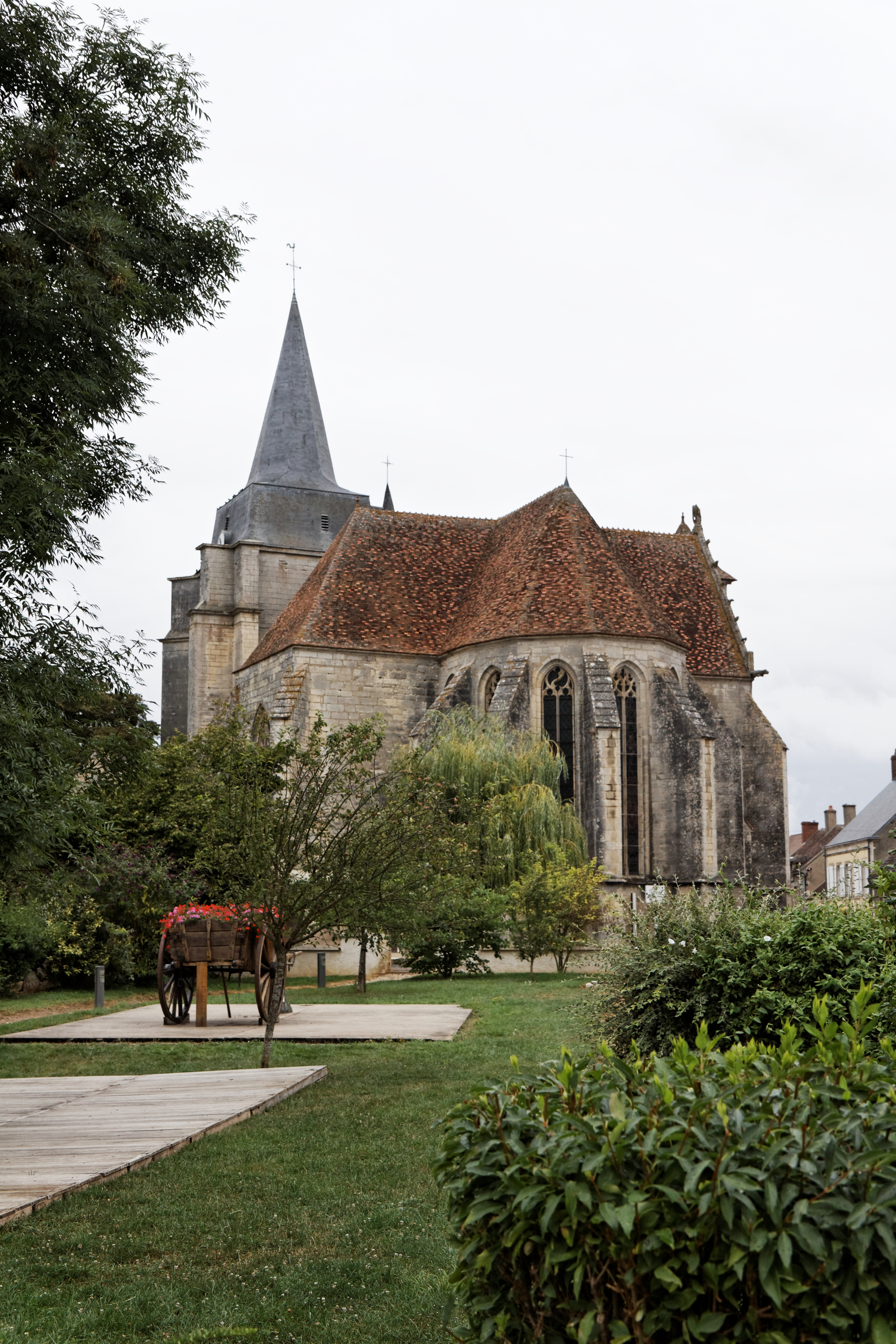 L'église Saint Symphorien de Suilly-la-Tour dans la Nièvre.